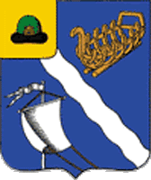 Герб Касимовского района Рязанской области